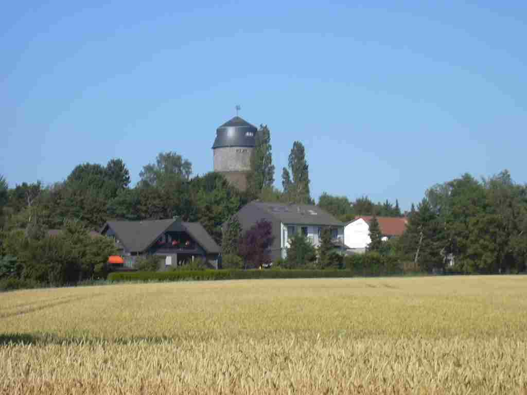 Merzenich, ehemalige Windmühle Own Work papa1234 2006-07-14